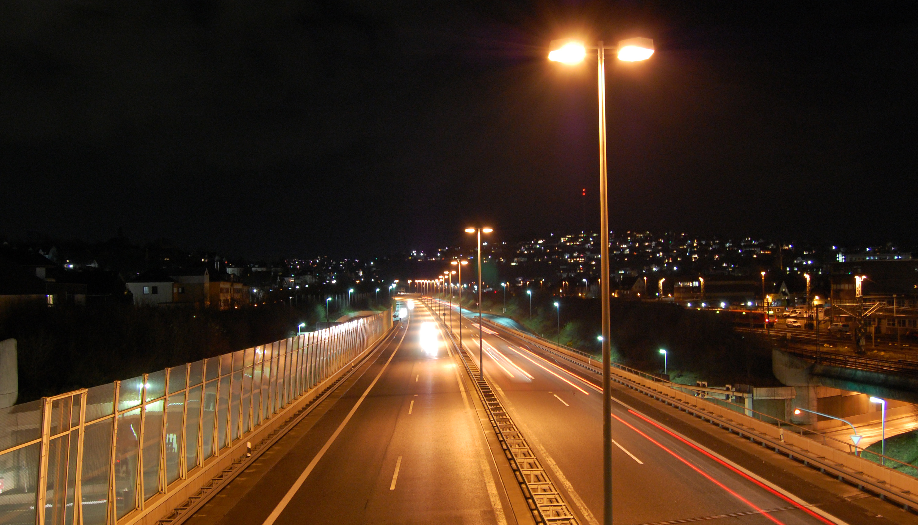 The "Hüttentalstraße" in Siegen at night.